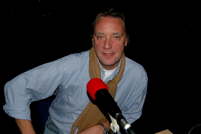 Jan Rietman interview voor Radio Westerwolde.